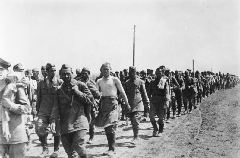 Unser Bild zeigt einige der 3000 Gefangene, die bei den Kämpfen umd Balta gemacht wurden. PK-Brunnengräber, Scherl 14.8.41 [Herausgabedatum]